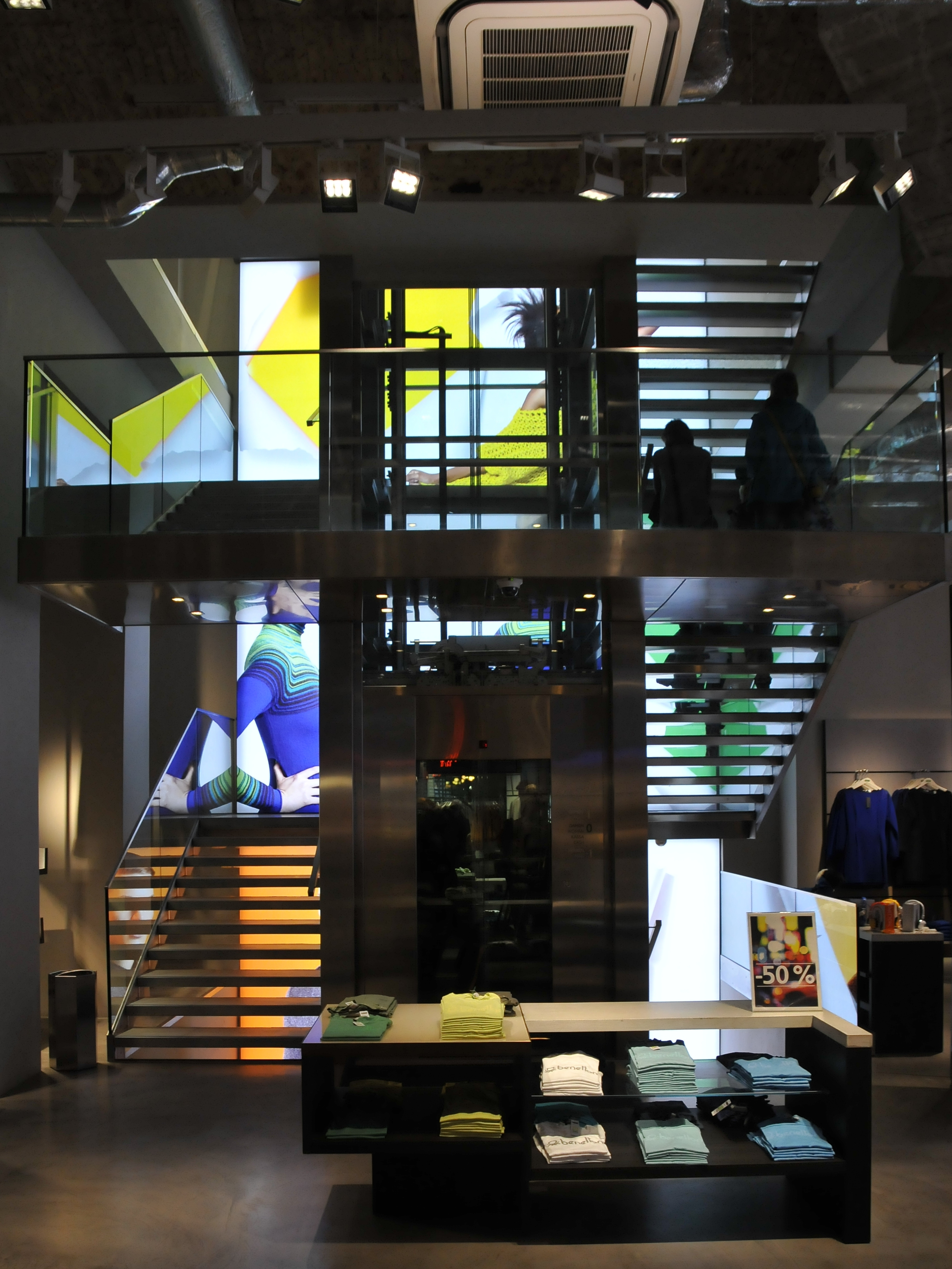 Kärntner Straße Nr.43: Die Benetton Group ist ein italienisches Unternehmen, das im Mode- und Bekleidungsgeschäft tätig ist. Das Unternehmen gehört zur Finanzholding der Familie Benetton, Edizione srl, die 67 Prozent der Aktien in Besitz hat.